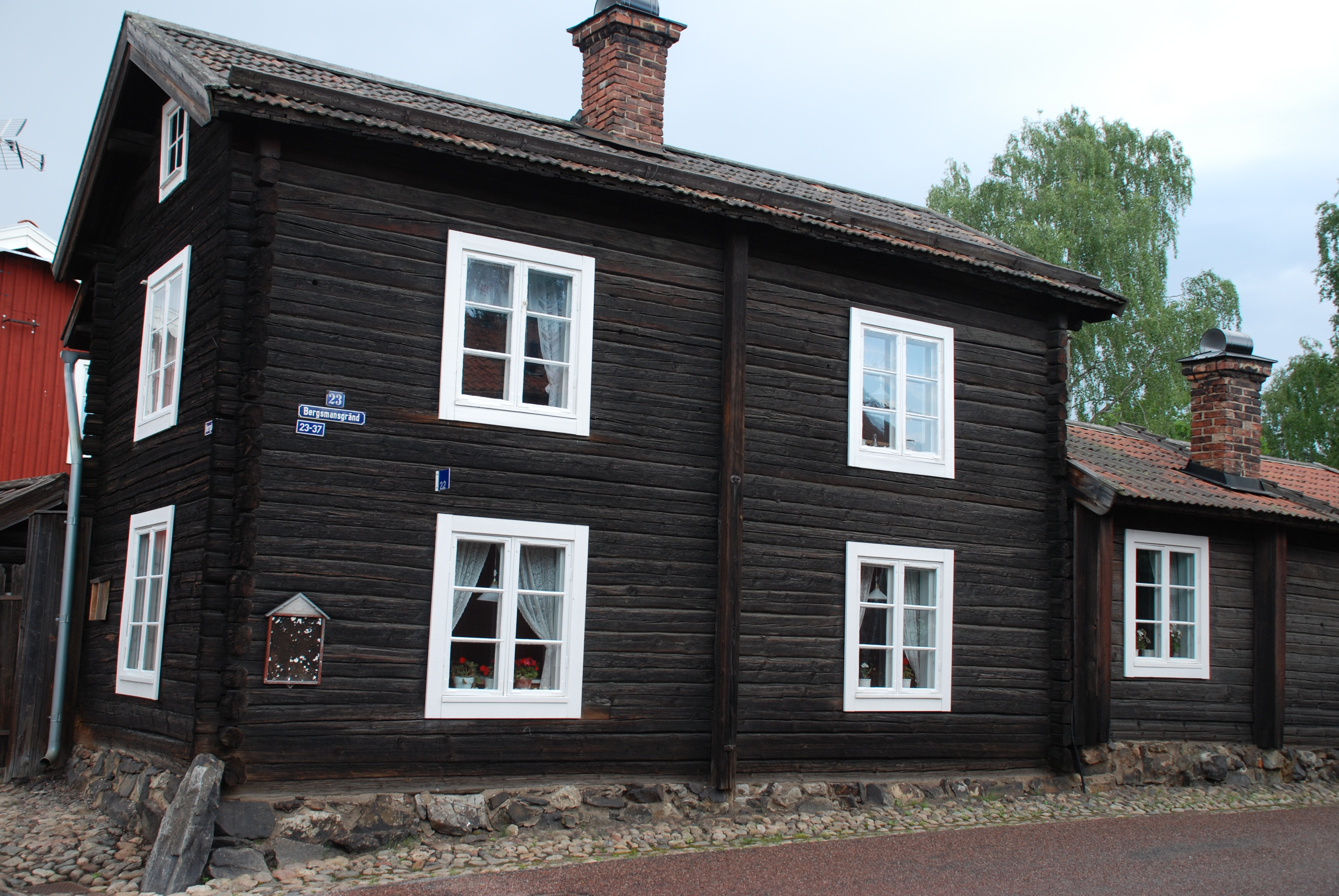 Gruv- och hyttarbetaregården Vass Britas vid Herrgårdsgränd 8/Bergsmansgränd 23 i stadsdelen Gamla Herrgården i Falun.